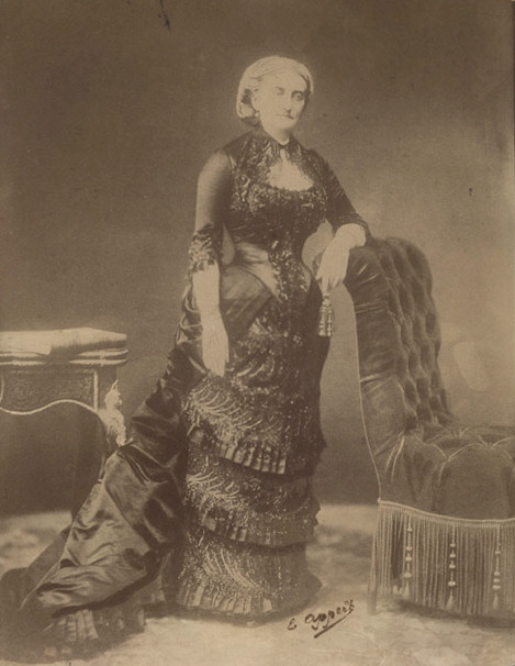 Maria Karolina Augusta von Neapel & Sizilien (1822–1869), Herzogin von Aumale